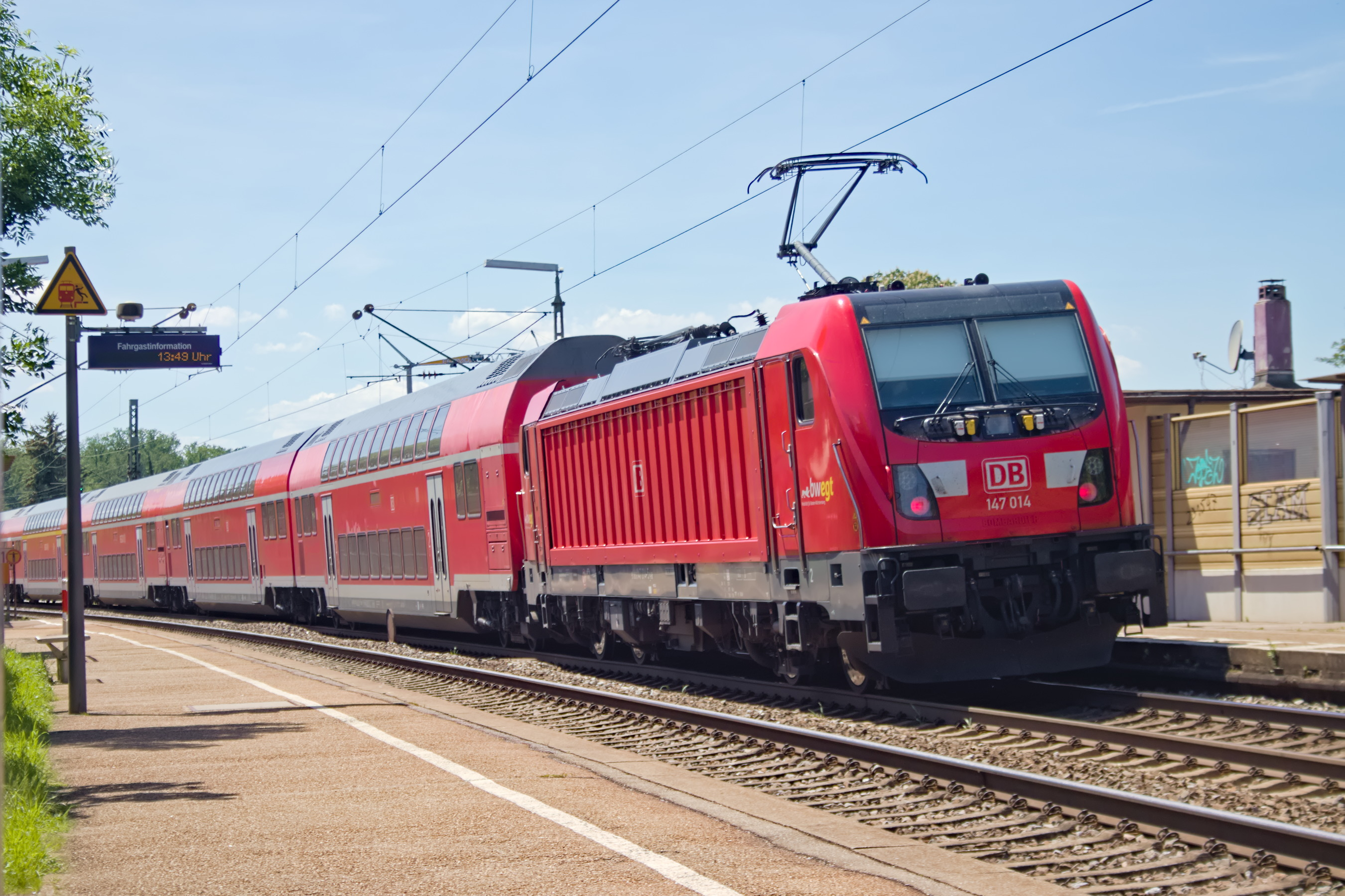 DB 147 014 schiebt den RE nach Karlsruhe aus dem Bahnhof Sersheim.